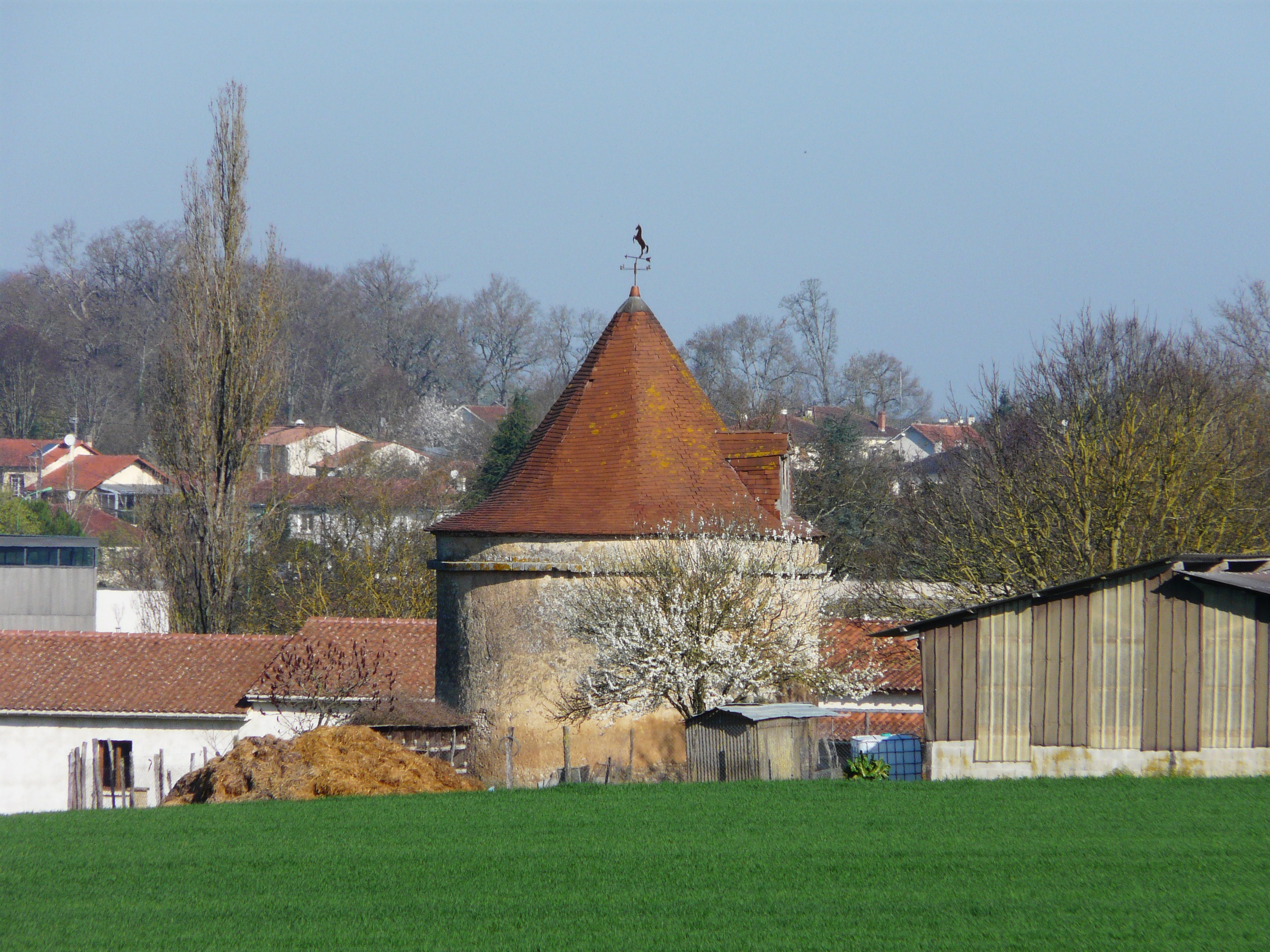 Le pigeonnier de la Grande Ferrière, Ribérac, Dordogne, France.